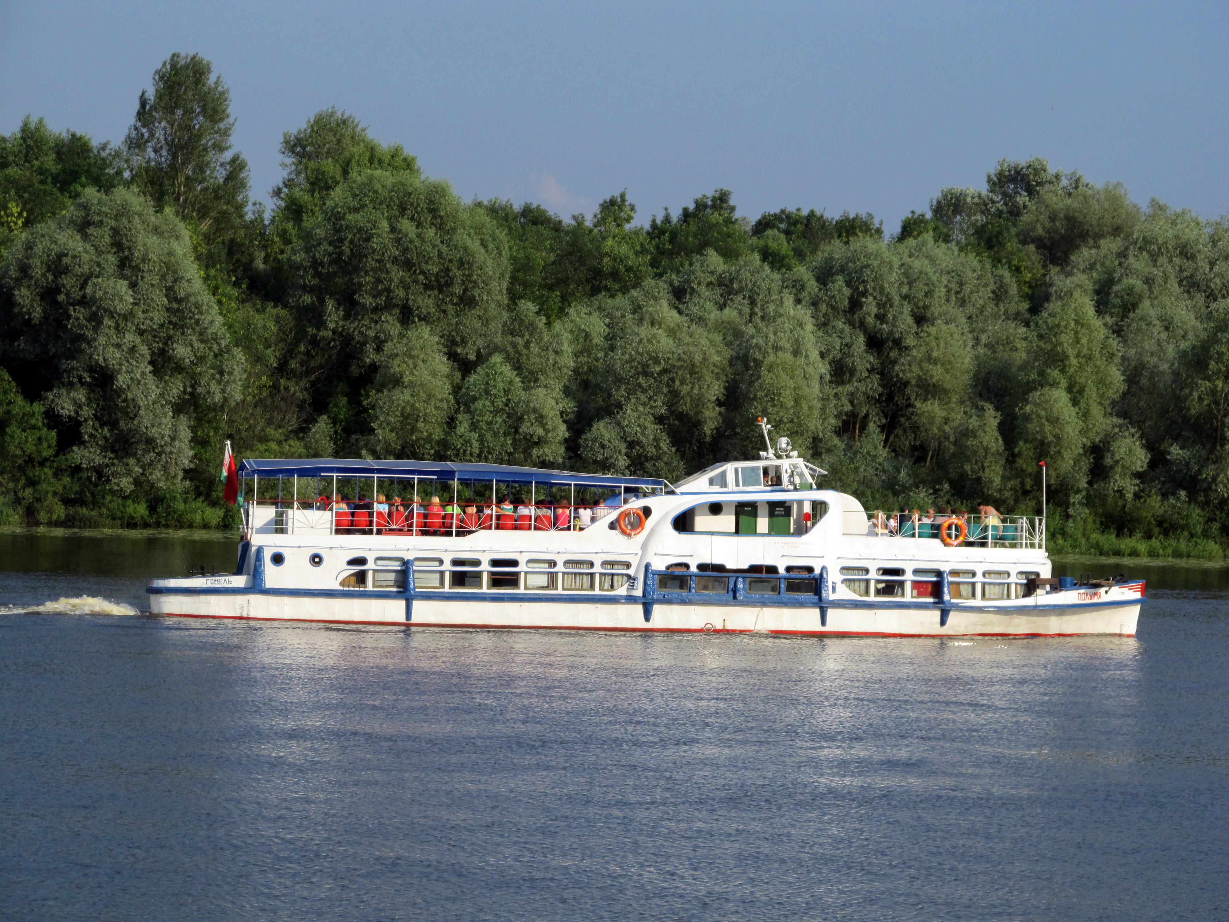 Беларуская (тарашкевіца): Палацава-паркавы ансамбаль: палац, дэкаратыўнае аздабленьне інтэр’ера вежы і цэнтральнай залі палаца, Петрапаўлаўскі сабор, капліца-пахавальня,парк. г. Гомель This is a photo of Belarusian heritage monument. Reference number: 310Г000044 ( WLM)